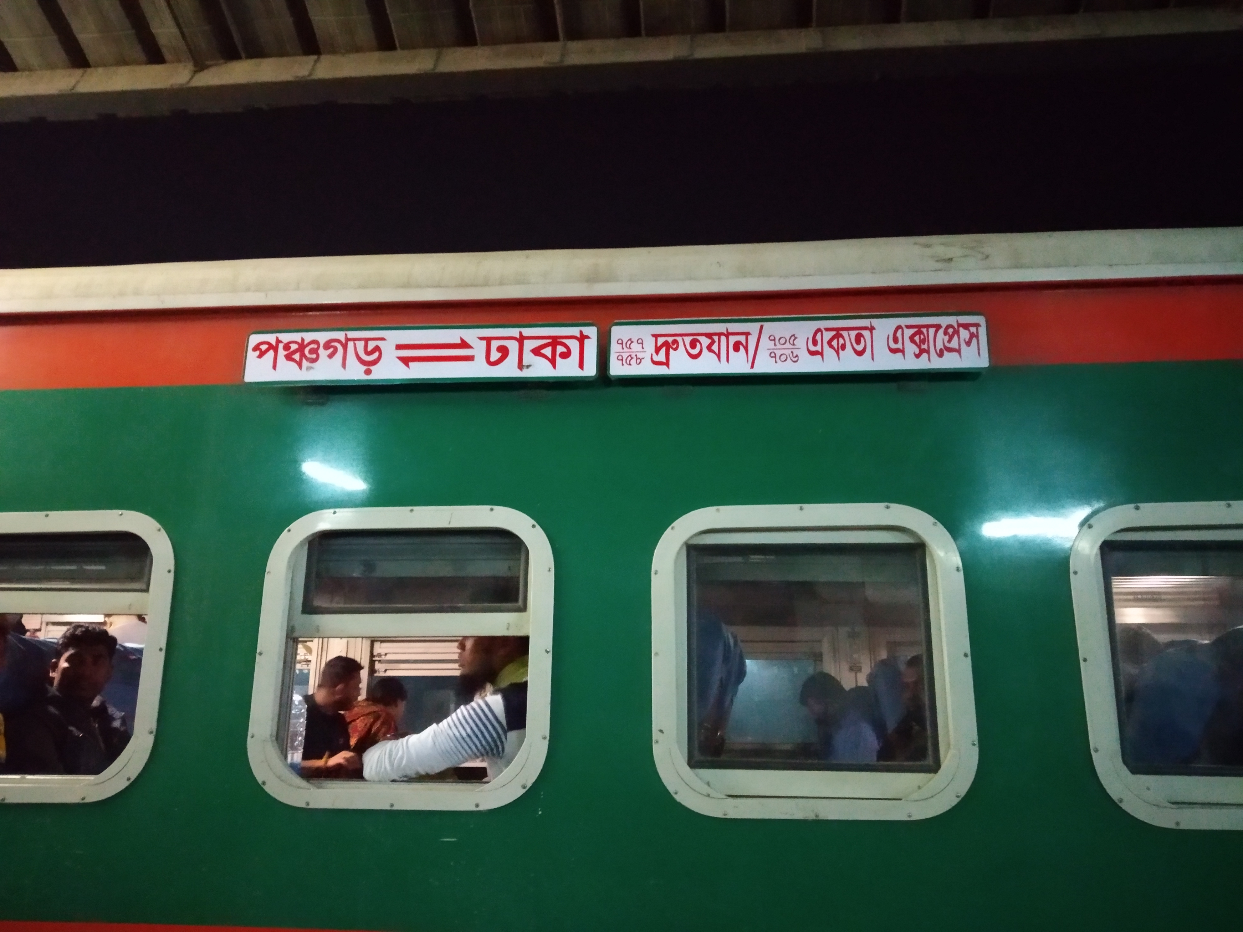 Drutajan Express